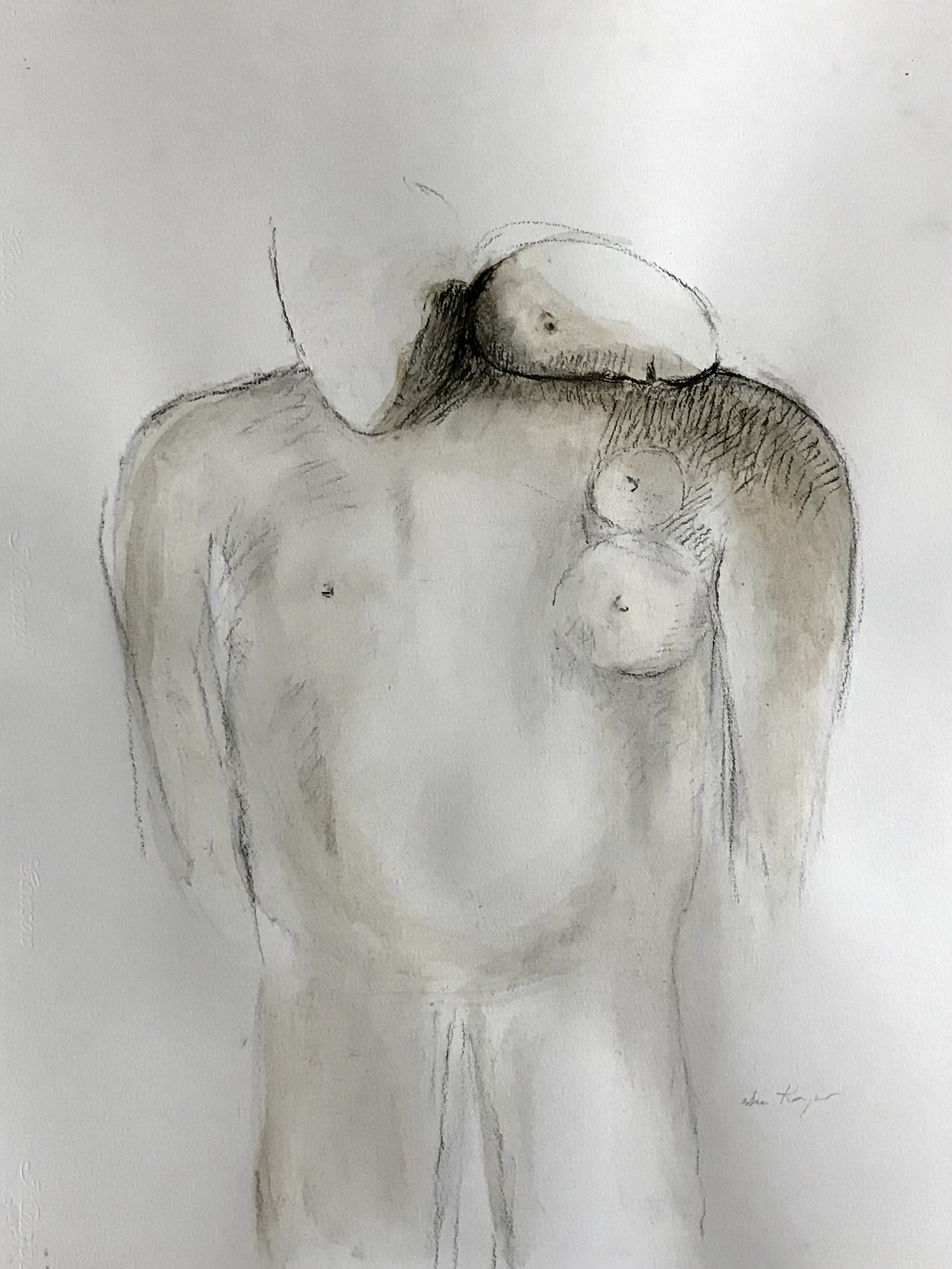 fusain sur papier